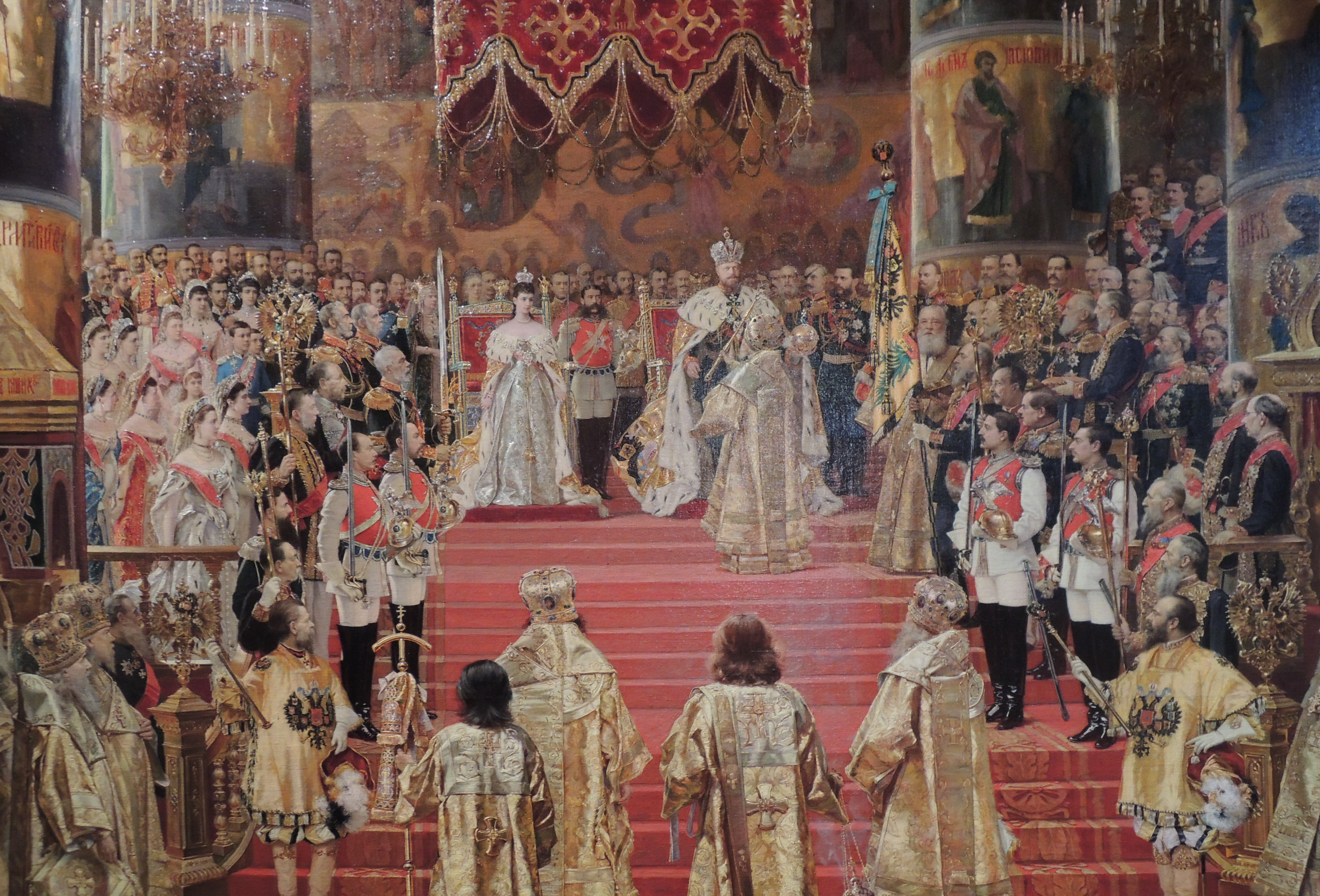 Ж. Беккер. "Коронация императора Александра III и императрицы Марии Федоровны 25 мая 1883 года" (1888), Эрмитаж. 108х156 см ЭРЖ-1637 Coronation of Maria Fyodorovna and Alexander III